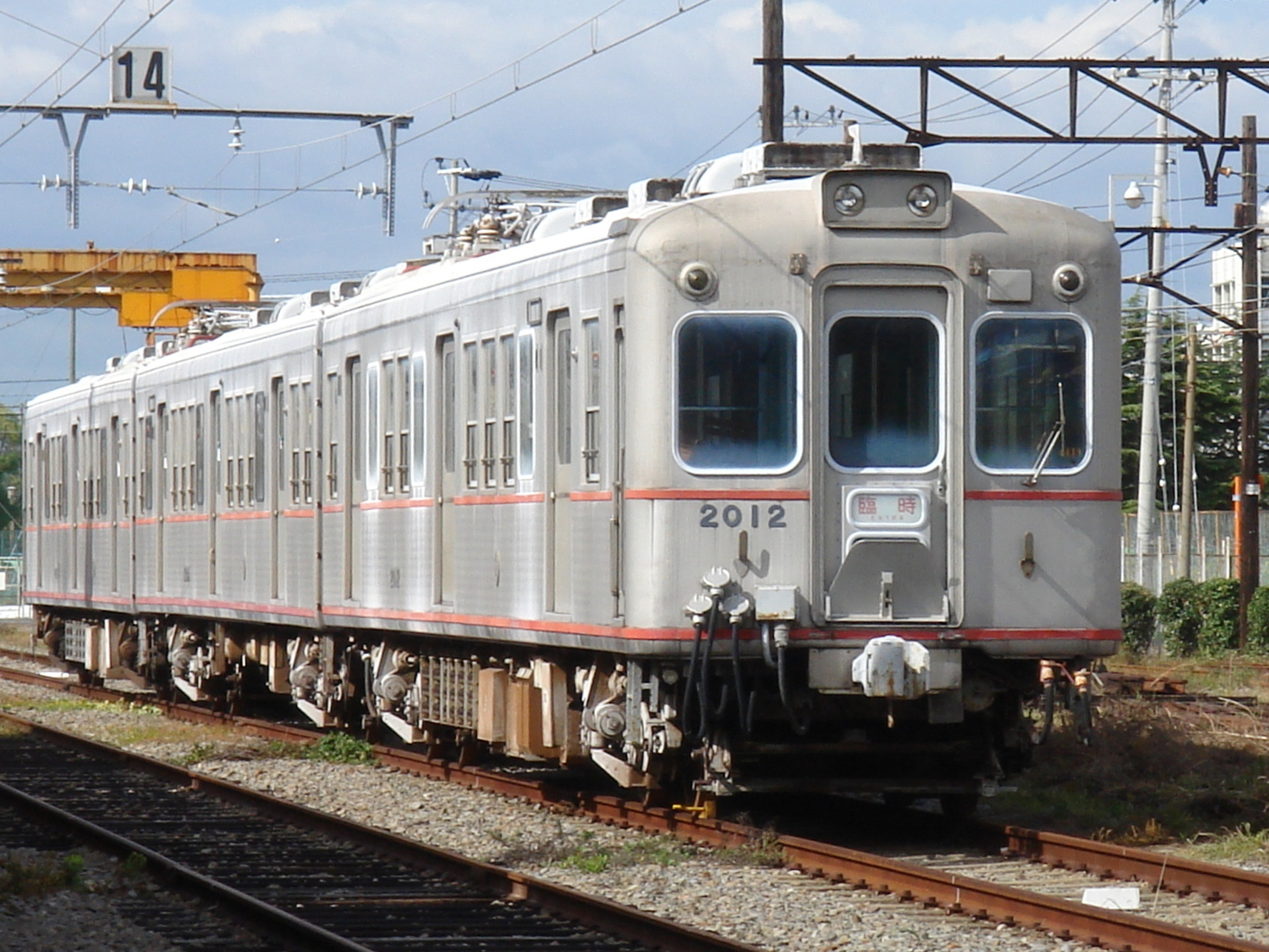 山陽・２０００系アルミカーの保存車両（車庫一般公開時に撮影）